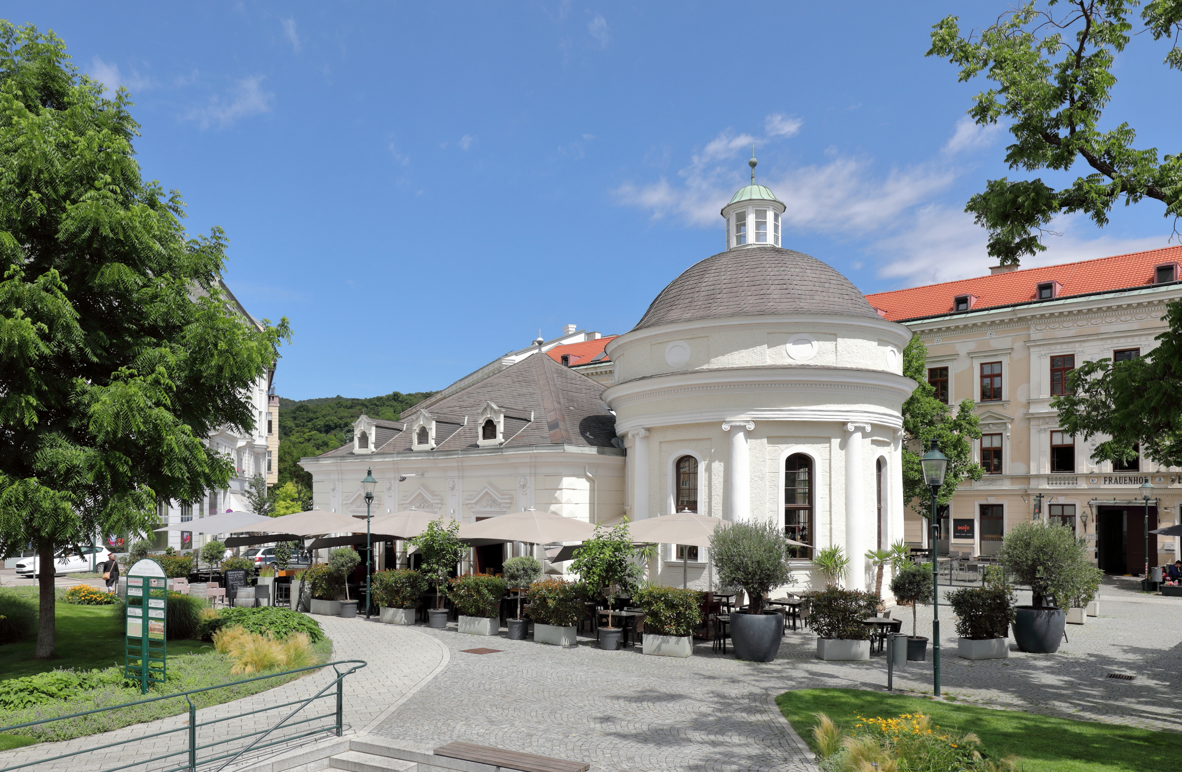 Das ehemalige Josefsbad an der Adresse Josefsplatz 2 in der niederösterreichischen Stadt Baden.Nachdem durch die Türkenbelagerung 1683 der Vorgängerbau zerstört wurde, errichtete man 1697 einen barocken Rechteckbau. 1804 wurde dieser ostseitig mittels einem klassizistischen runden Kuppelbau erweitert. Dieses Bauwerk wird dem k.k. Hofarchitekten Louis Montoyer zugeschrieben. Seit den 1970er Jahren wird das ehemalige Josefsbad als Gastronomiestätte genutzt.